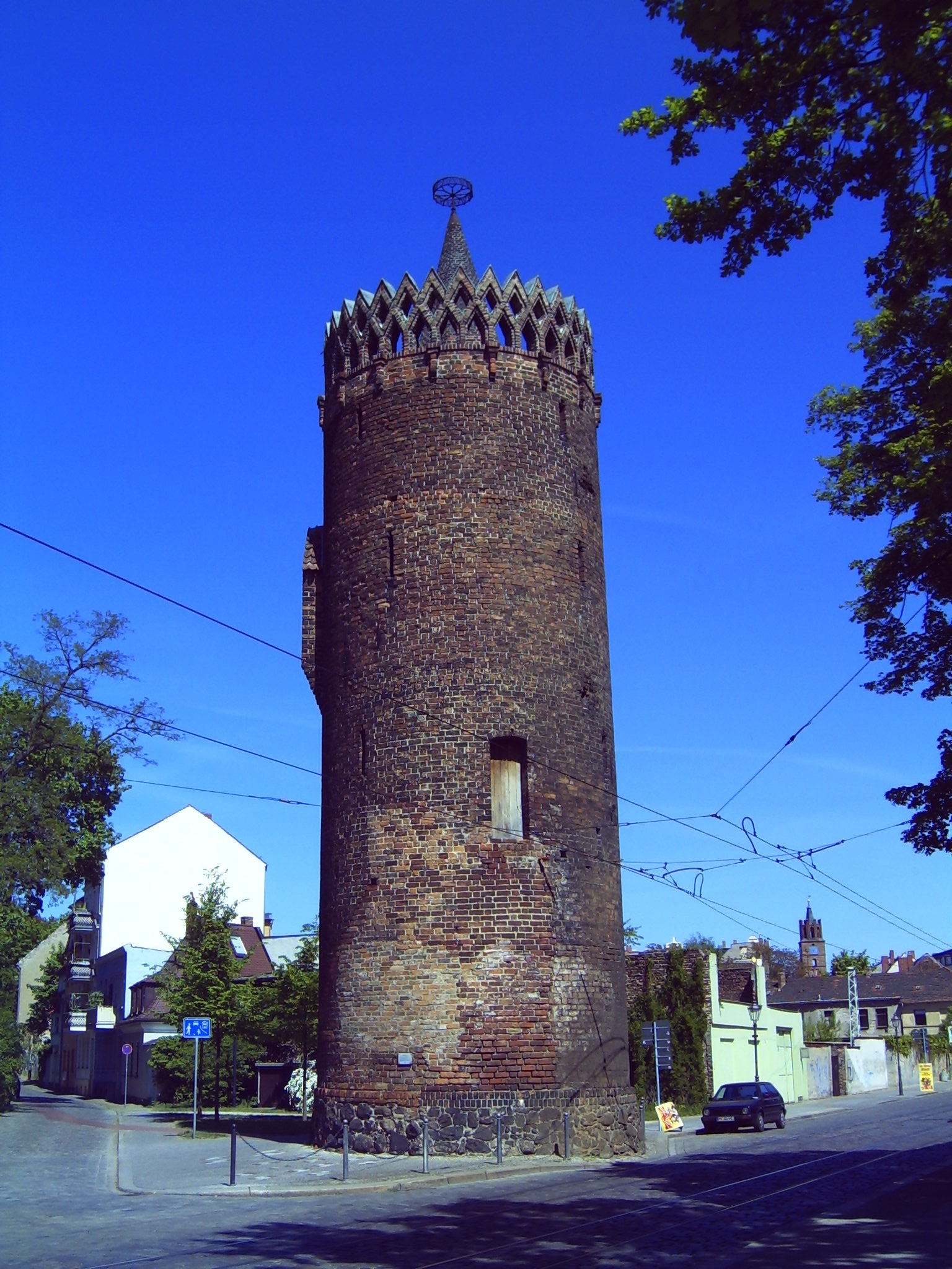 Plauer Torturm